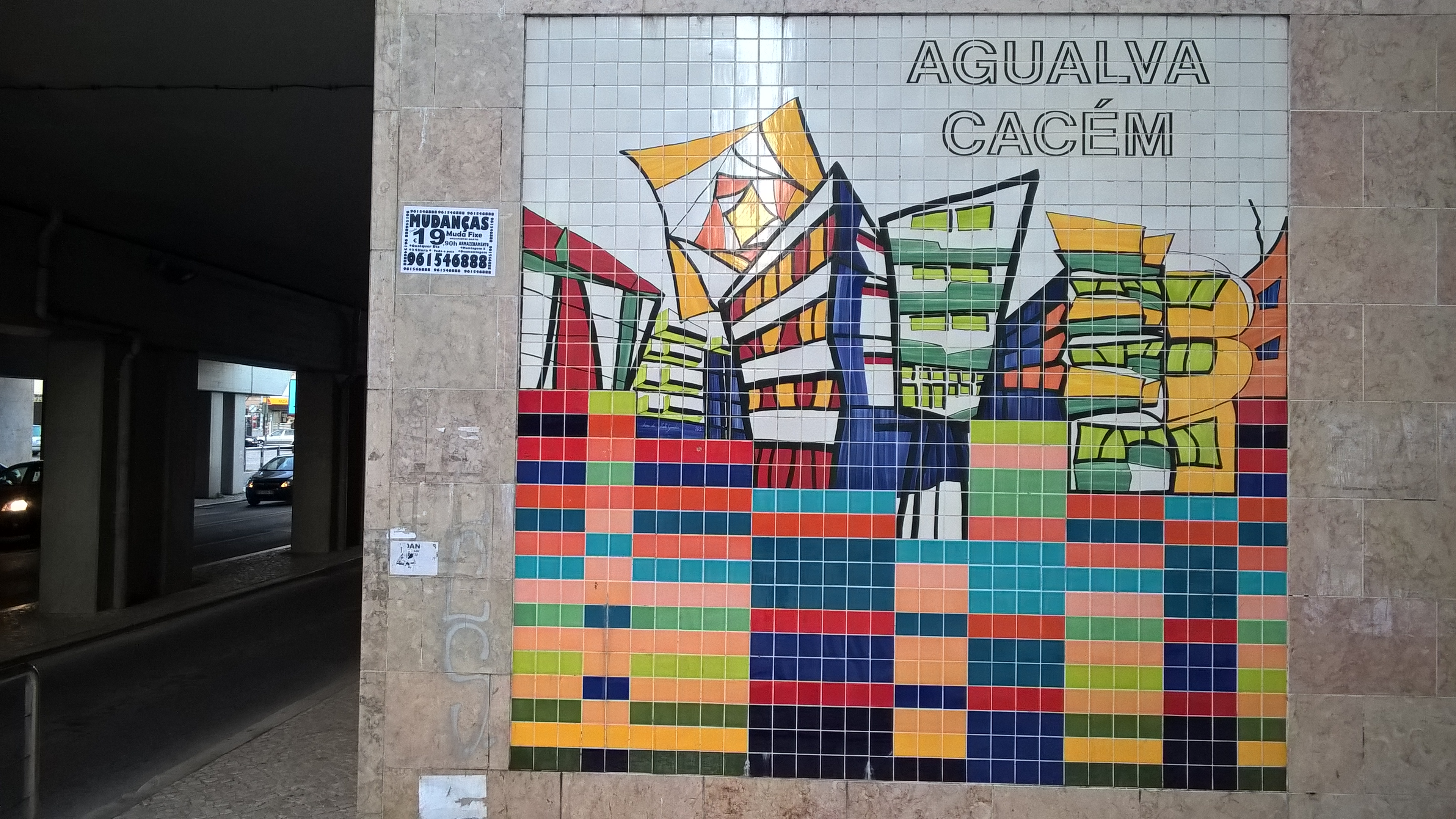 Agualva-Cacém train station Painel de Azulejos